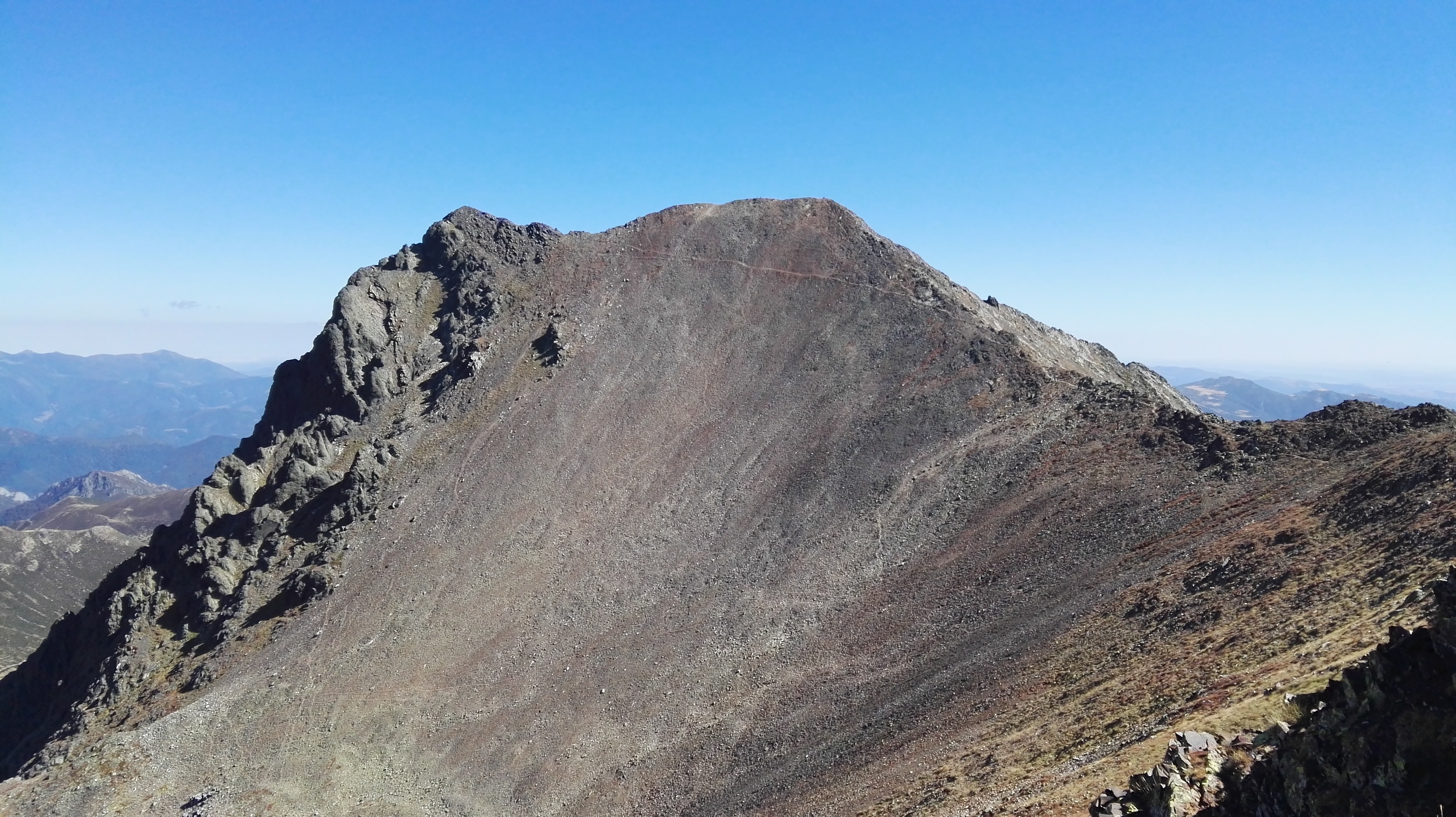 Vista de Peña Prieta, la cumbre predominante del macizo de Fuentes Carrionas en la Cordillera Cantábrica (España)